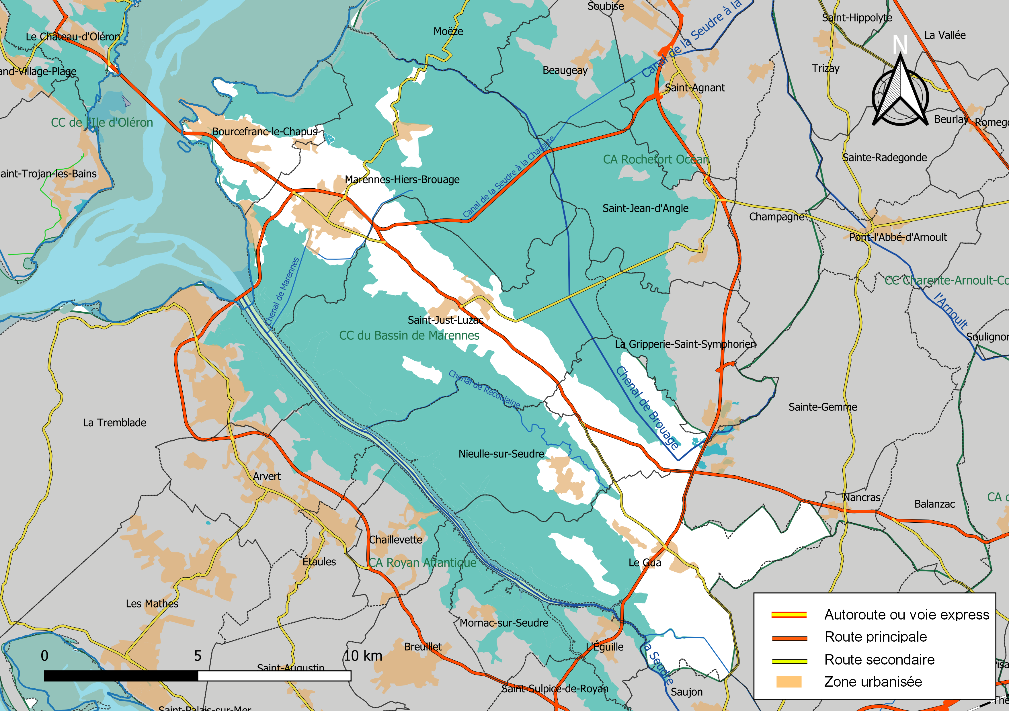 Carte géographique de la Communauté de communes du Bassin de Marennes, département de la Charente-Maritime, France. Composition au 1er janvier 2019.